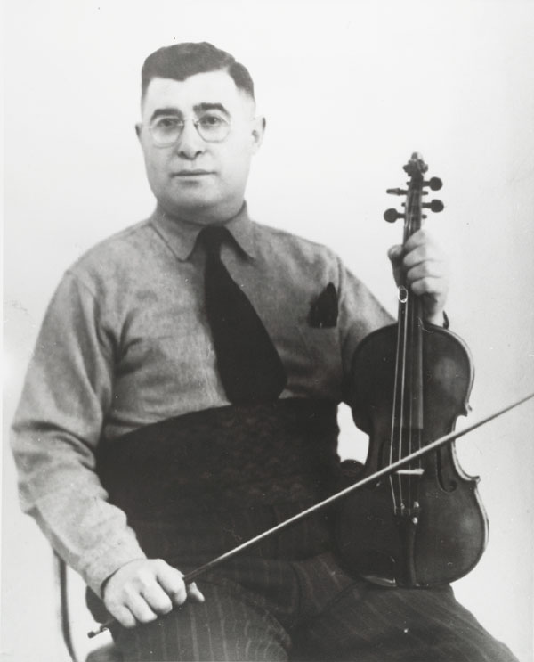 Isidore Soucy, violoneux et compositeur (1899-1963)